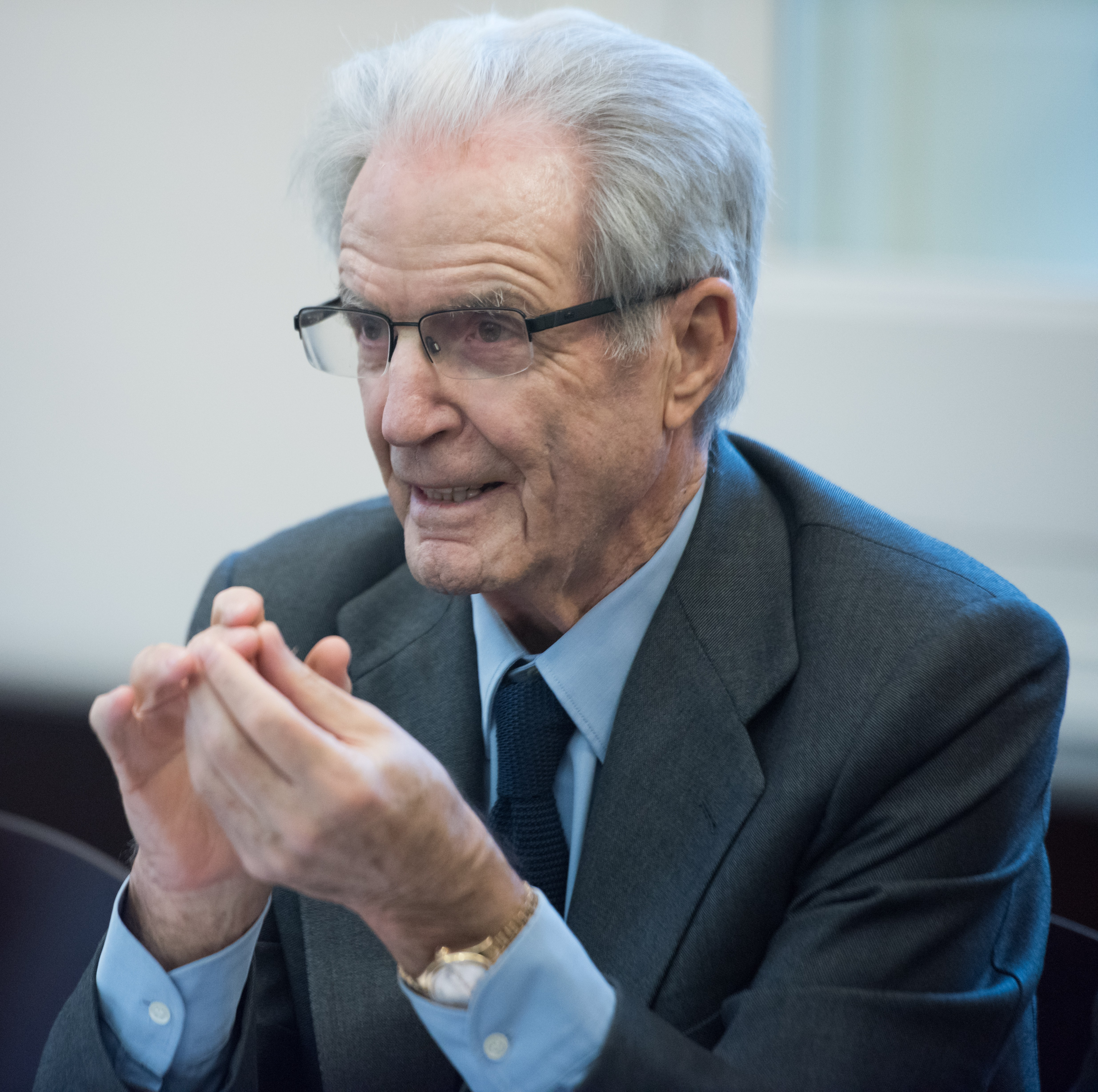 El pasado 15 de enero la Asociación de Alumni, VIA-Círculo Jefferson, celebró un desayuno en el American Space Madrid con Antonio Garrigues Walker.